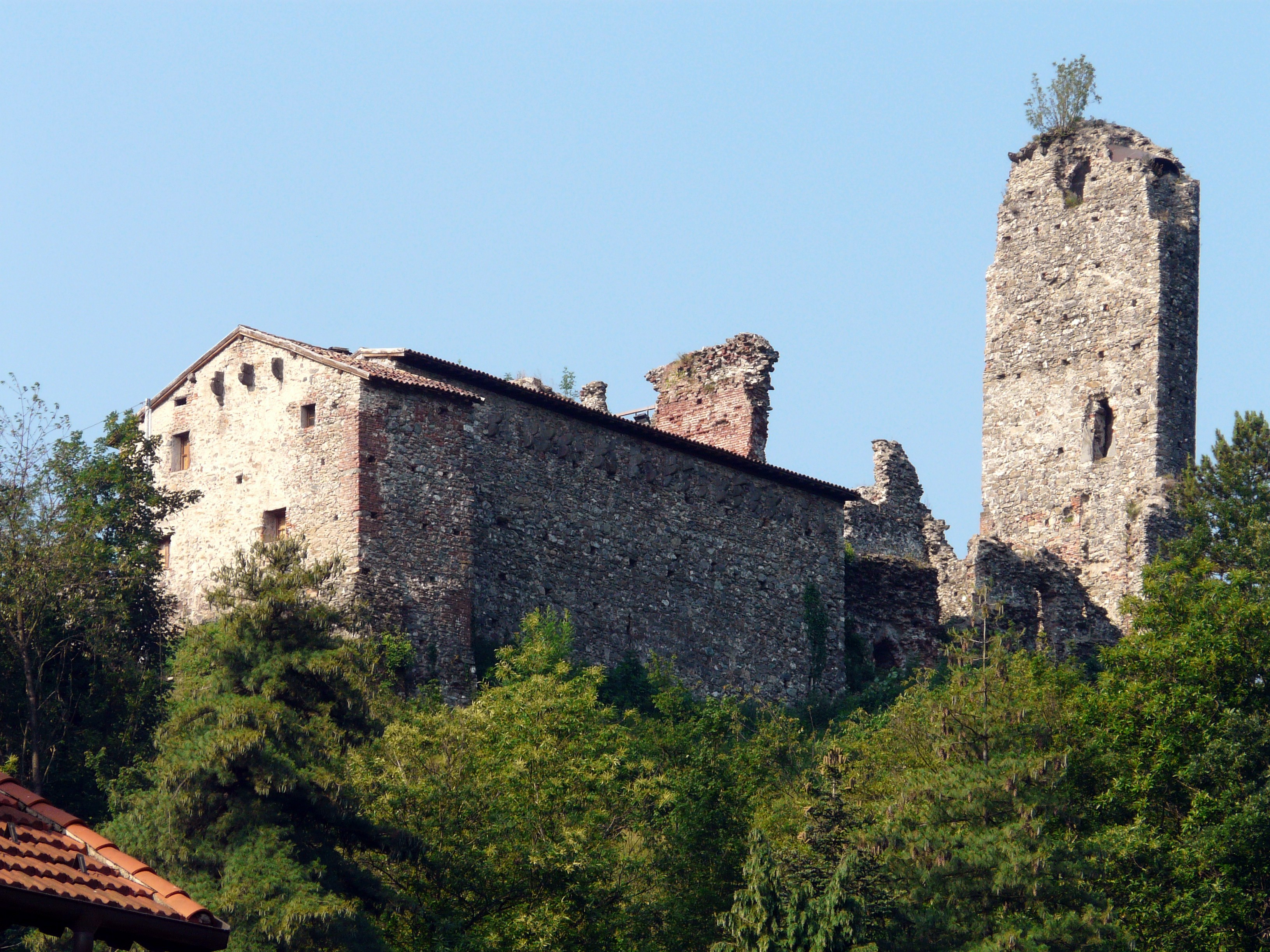 I ruderi del castello di Borgo Fornari a Ronco Scrivia, Liguria, Italia